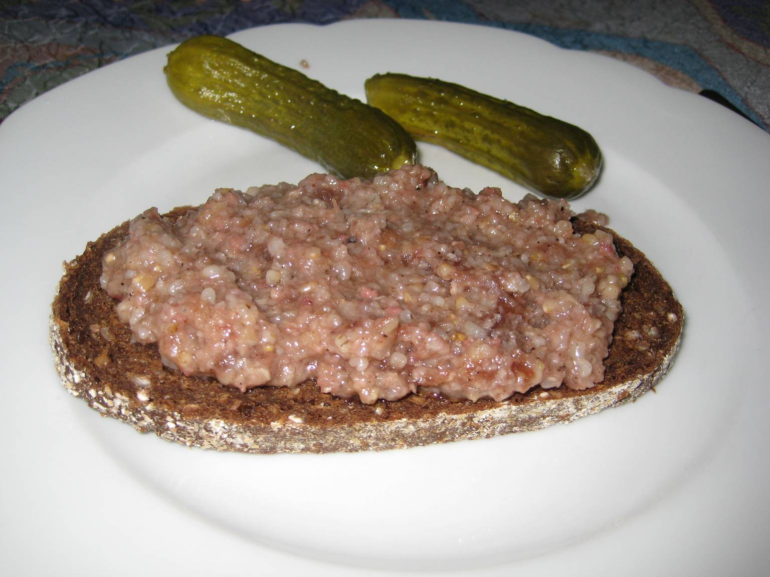 Foto der Speise Knipp auf Vollkornbrot